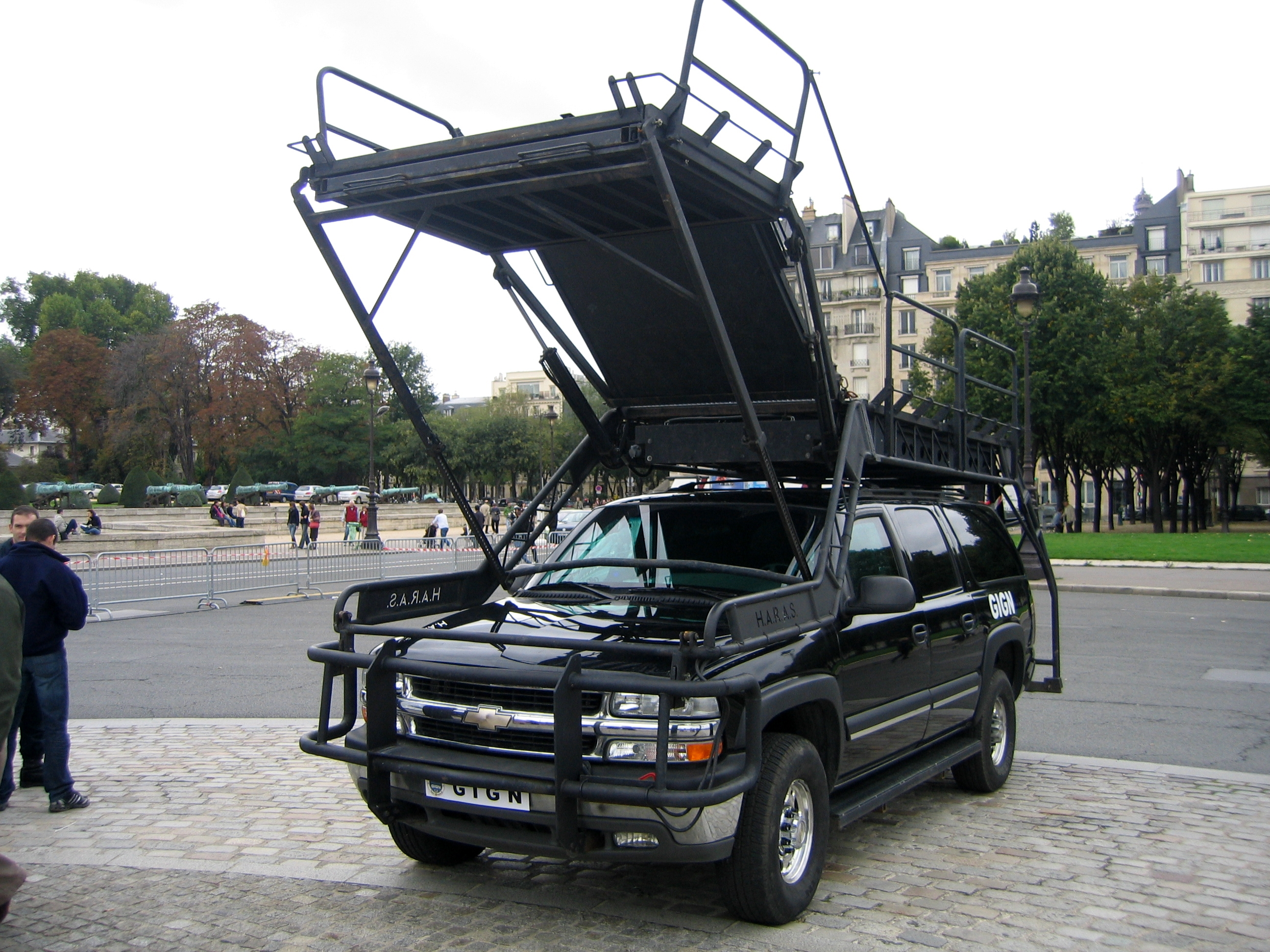 Véhicule d'intervention du GIGN lors des journées de sécurité intérieures 2009 sur l'esplanade des Invalides. À noter que le véhicule Chevrolet Suburban 4x4 SWATEC est équipé du système HARAS (Height Adjustable Rescue Assault System).